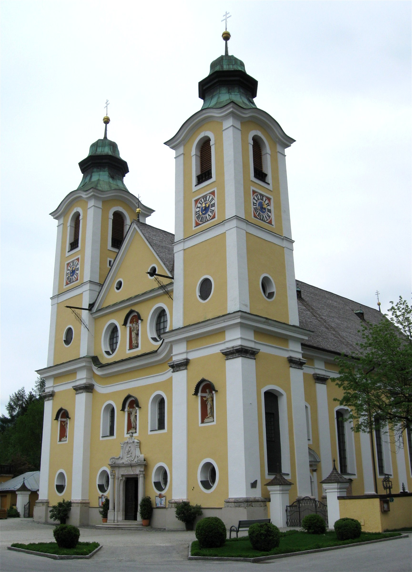 zu Ehren Mariae Himmelfahrt, des hl. Johannes des Täufers und Evangelisten sowie der hl. Jungfrau und Märtyrin Katharina, hochbarocke Kirche von 1732[1]